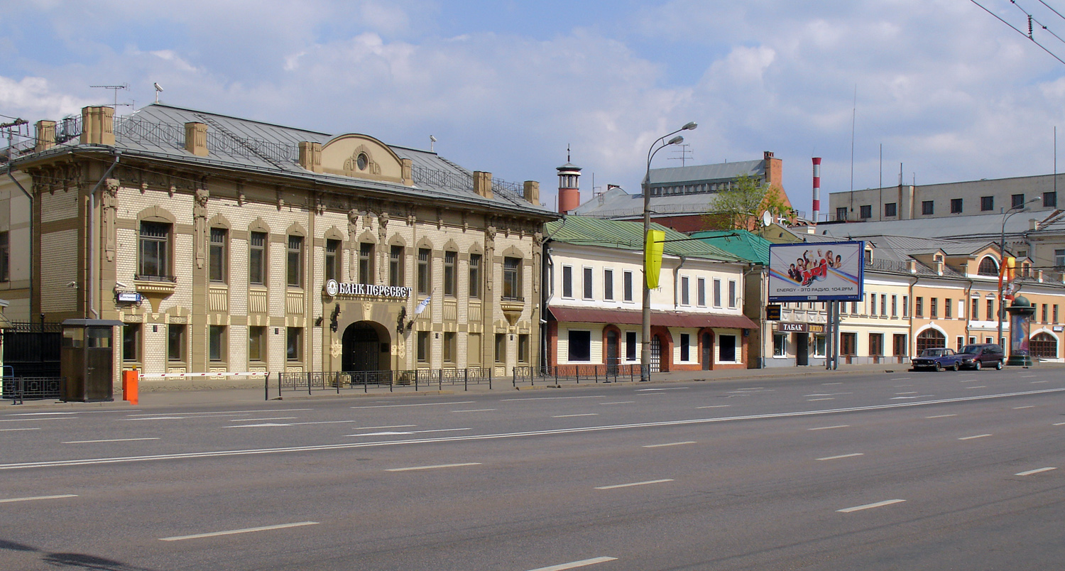 Sergiya Radonezhskogo (former Tulinskaya, former Voronya, former Vladimirka ...) Street, Moscow